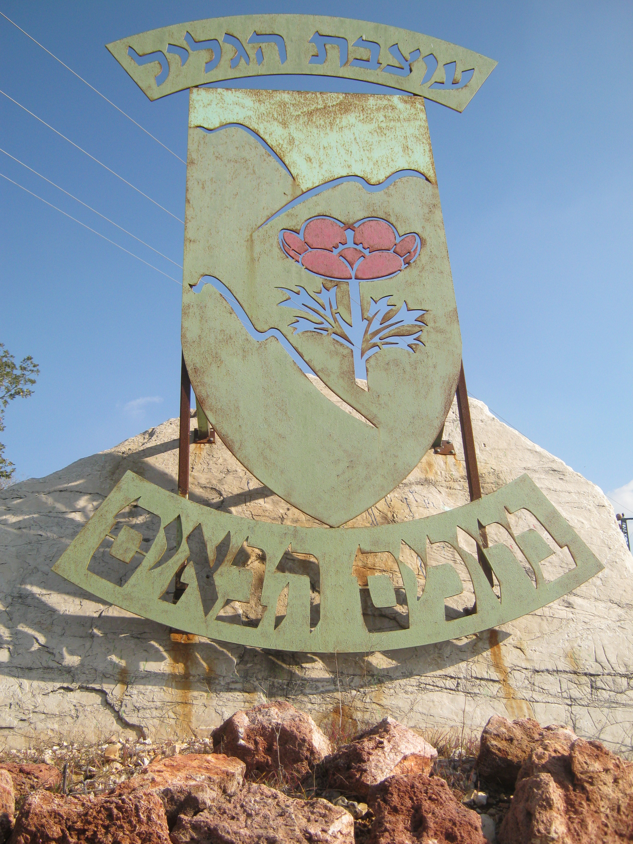 מחנה בירנית. שלט בכניסה לבסיס